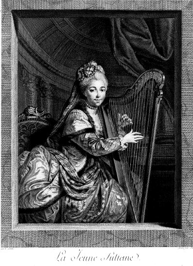 Portrait de Eugénie D'Hannetaire en jeune sultane